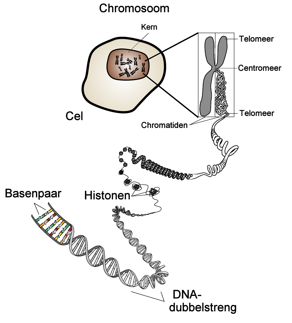 Modell der Feinstruktur eines Chromosoms.